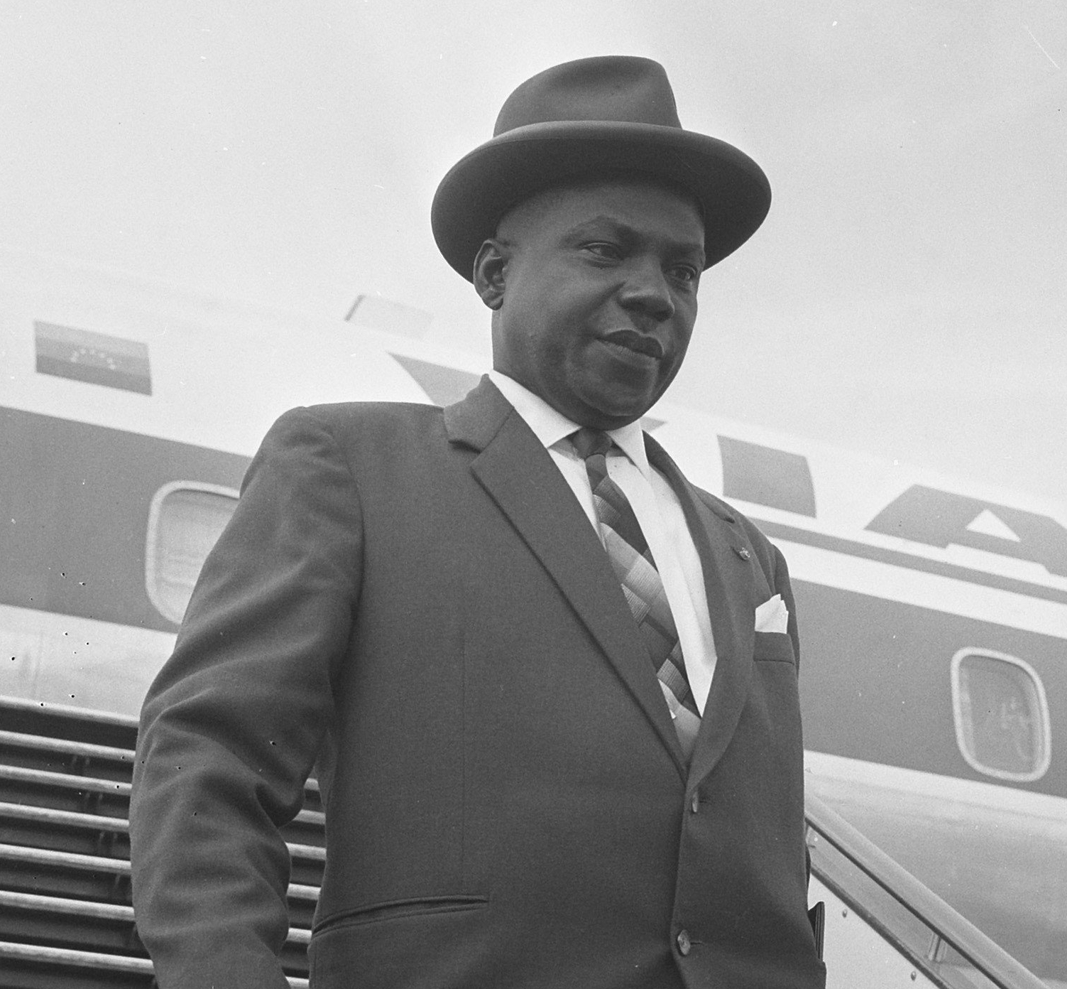 Aankomst minister van Sociale Zaken van Suriname Kraag